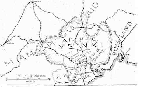 Carte du vicariat apostolique de Yenki (aujourd'hui diocèse de Yanji) en Mandchourie à la veille de 1945.